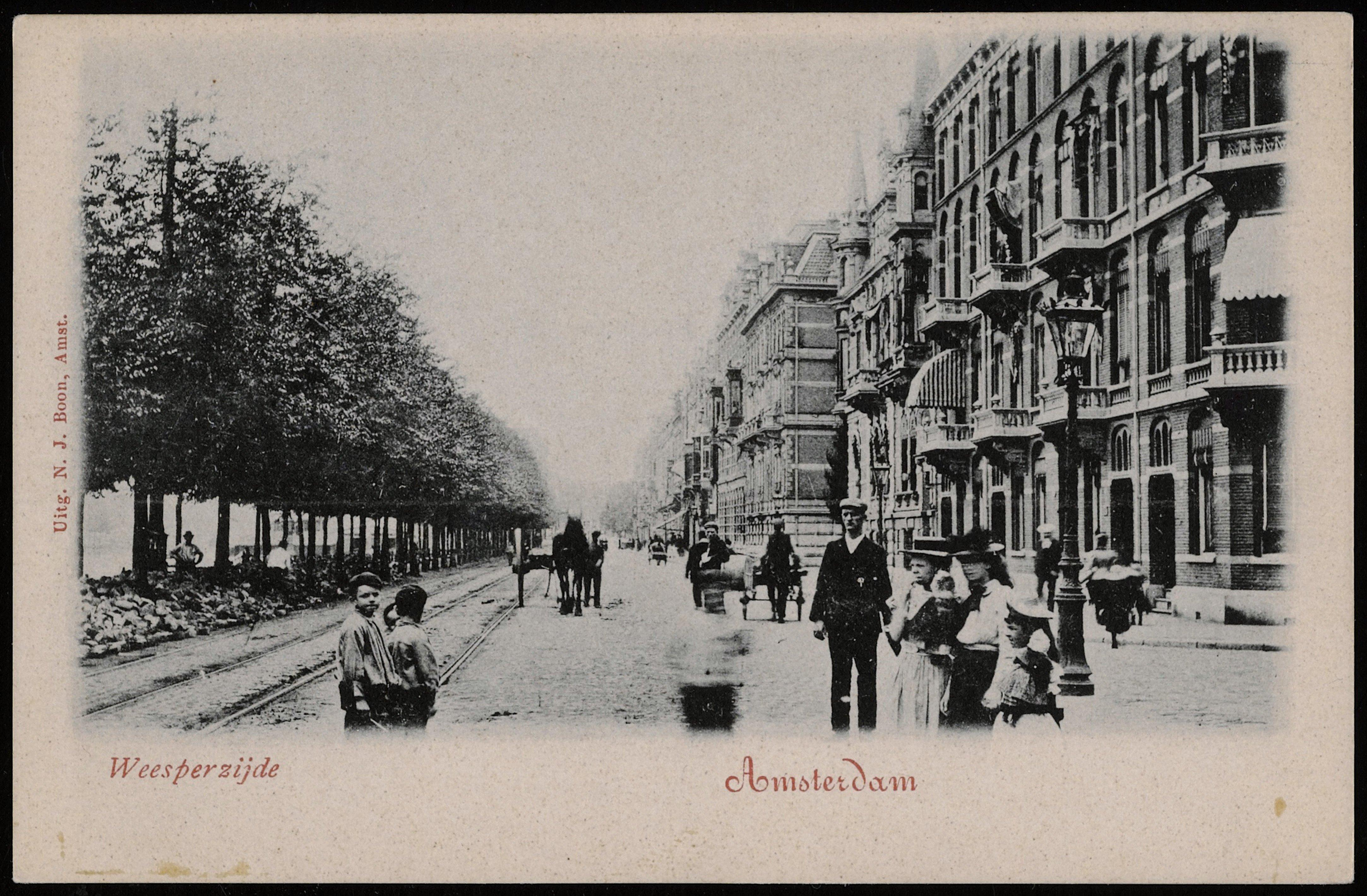 Beschrijving WeesperzijdeUitgave N.J. Boon, AmsterdamDocumenttype prentbriefkaartVervaardiger Boon, N.J. (uitgever)Collectie Collectie Stadsarchief Amsterdam: prentbriefkaartenDatering 1900Geografische naam WeesperzijdeInventarissen PRKBB00269000024 Generated with Dememorixer